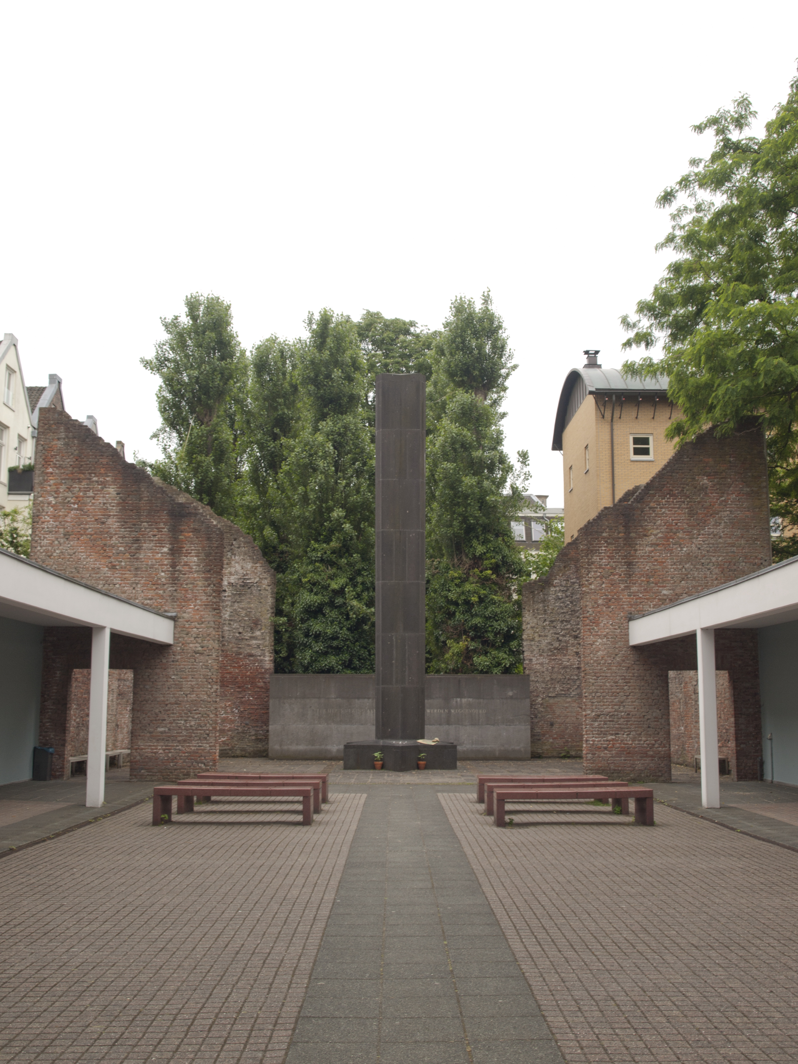 Amsterdam, Mahnmal in der Gedenkstätte Hollandsche Schouwburg